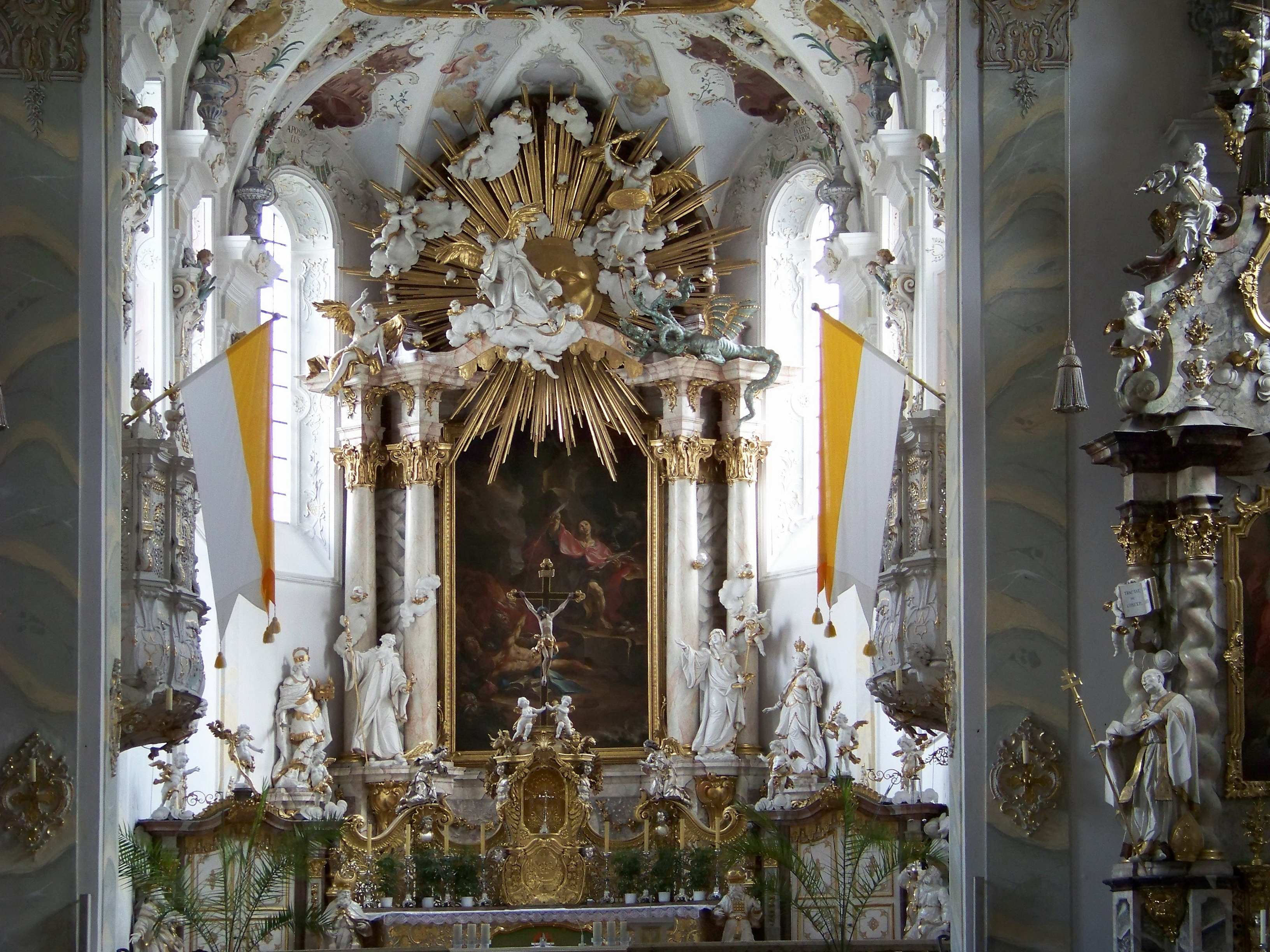 Mallersdorf-Pfaffenberg, Klosterberg 2. Katholische Pfarrkirche, ehemalige Klosterkirche St. Johannes Evangelist. Türme, Langhauskern und Westportal vor 1265, Chor 1463, wesentlicher Umbau 1613, Vorbau um 1755, Ausstattung im Laufe des 18. Jahrhunderts.